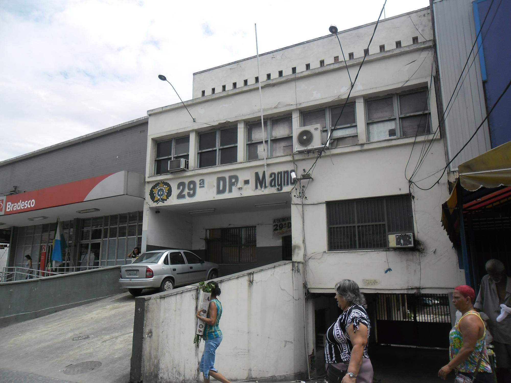 29ª DP, Magno (atualmente bairro de Madureira) - Rio de Janeiro - RJ.